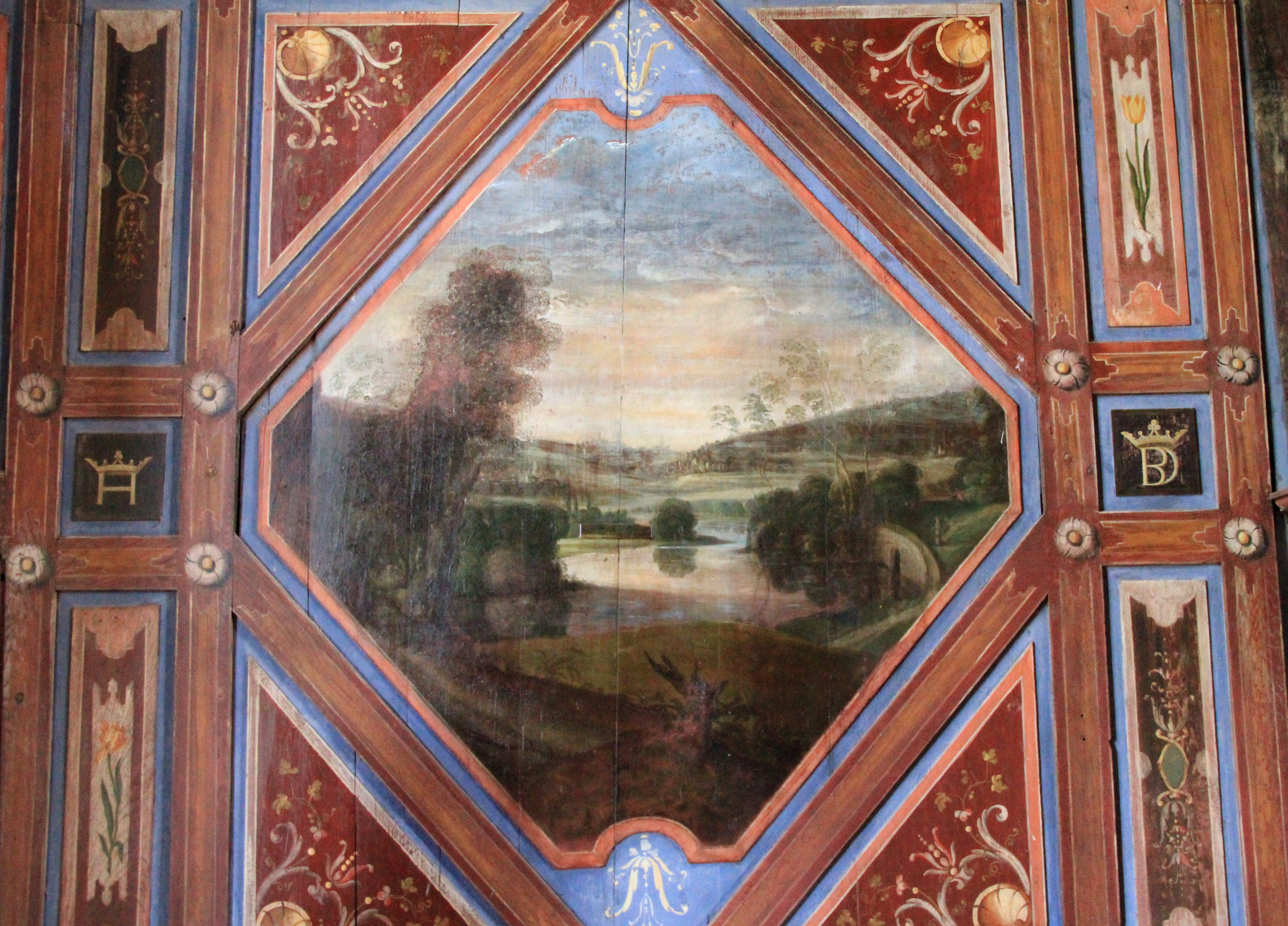 This building is en partie classé, en partie inscrit au titre des Monuments Historiques. .